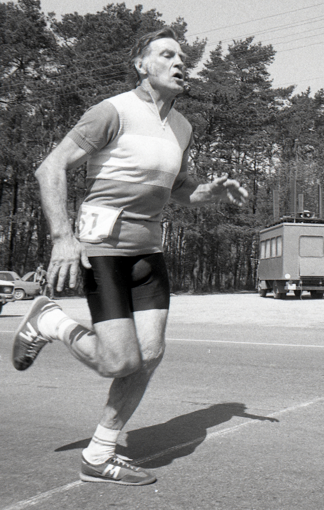 Uno Loop